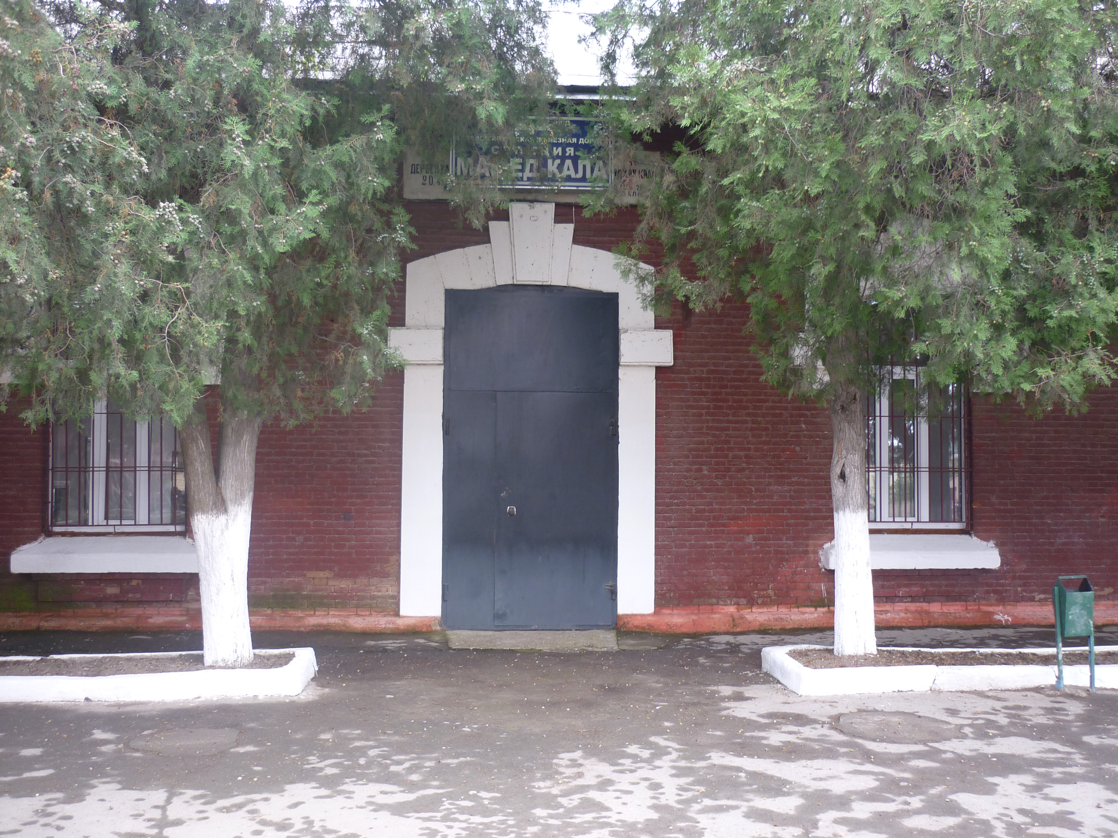 Терминал_п.Мамедкала